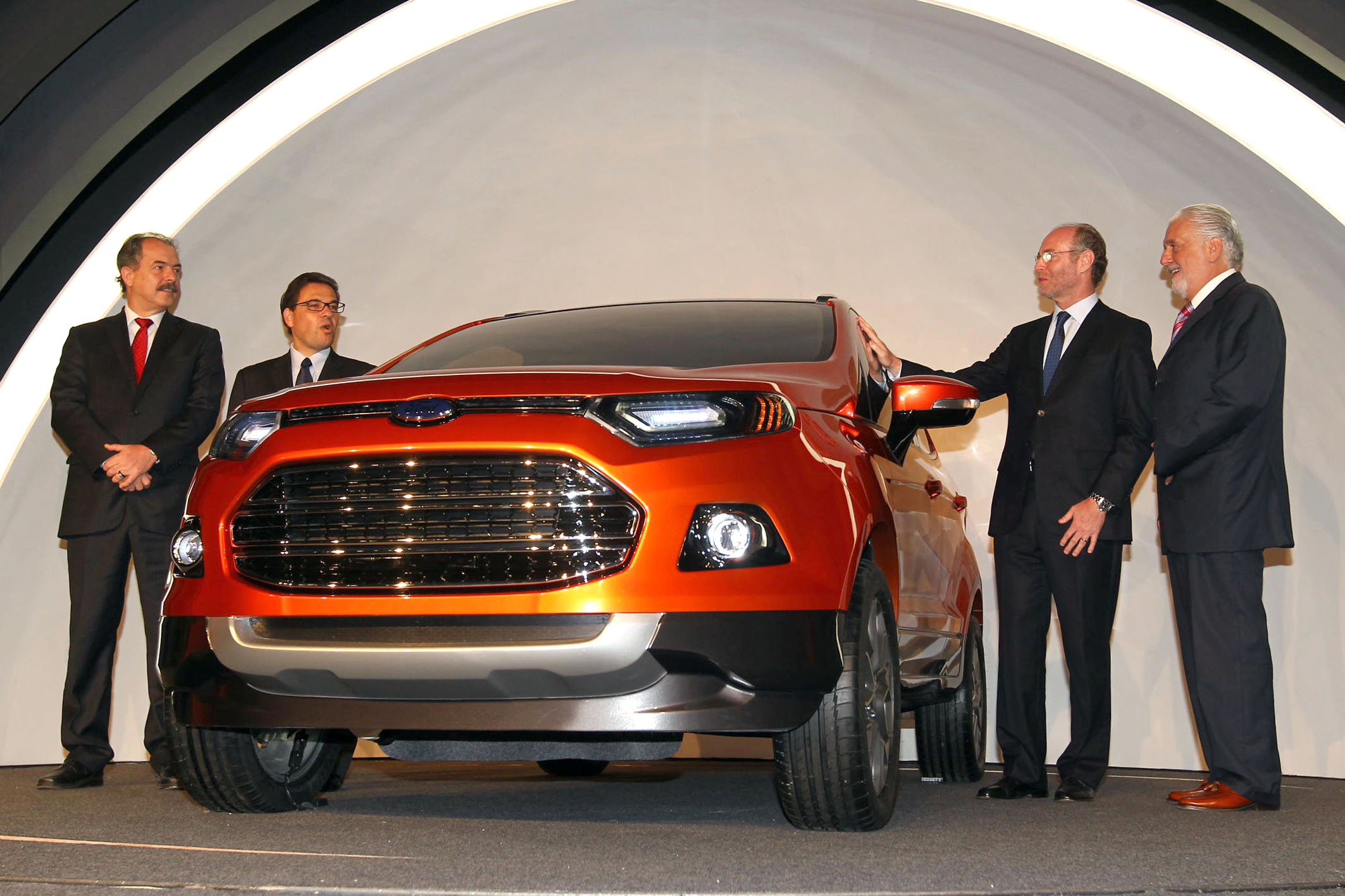 Governador Jaques Wagner participa do lançamento do novo Ford Ecosport em Brasília. Foto: Manu Dias/SECOM